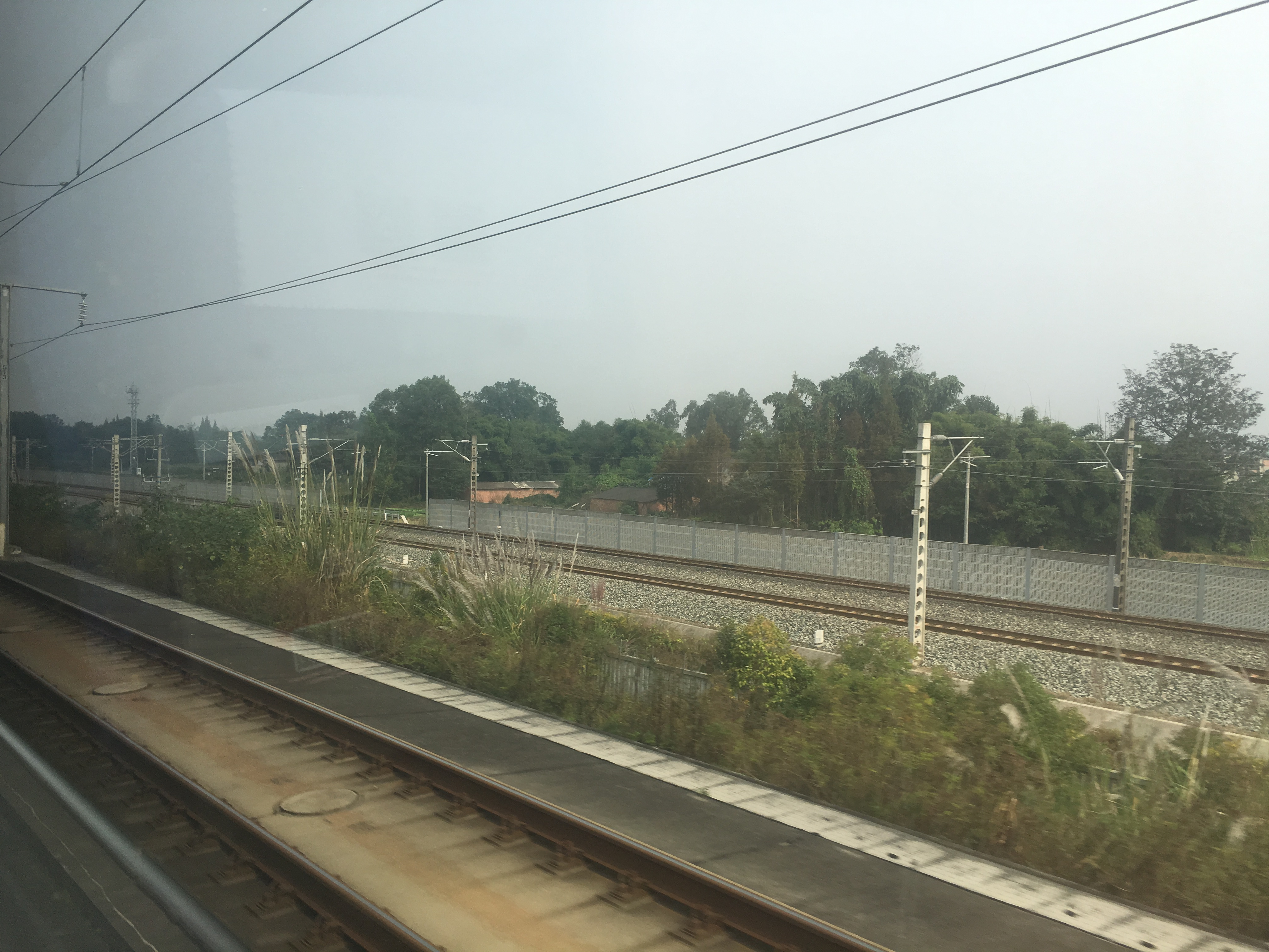 在成贵客专上拍摄的成昆铁路成峨复线，可见增建的接触网立杆